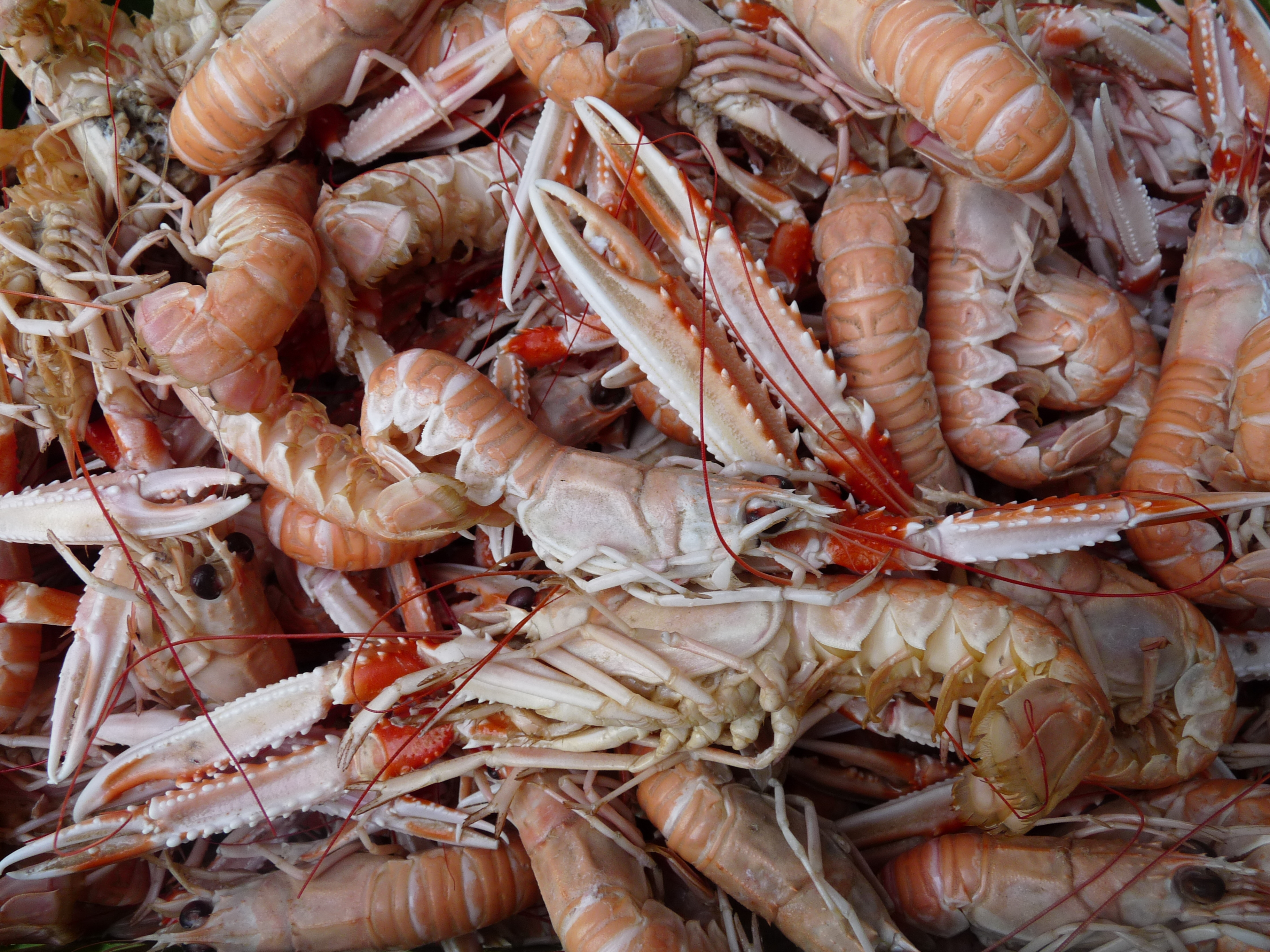 Langoustines de Crozon (Finistère)